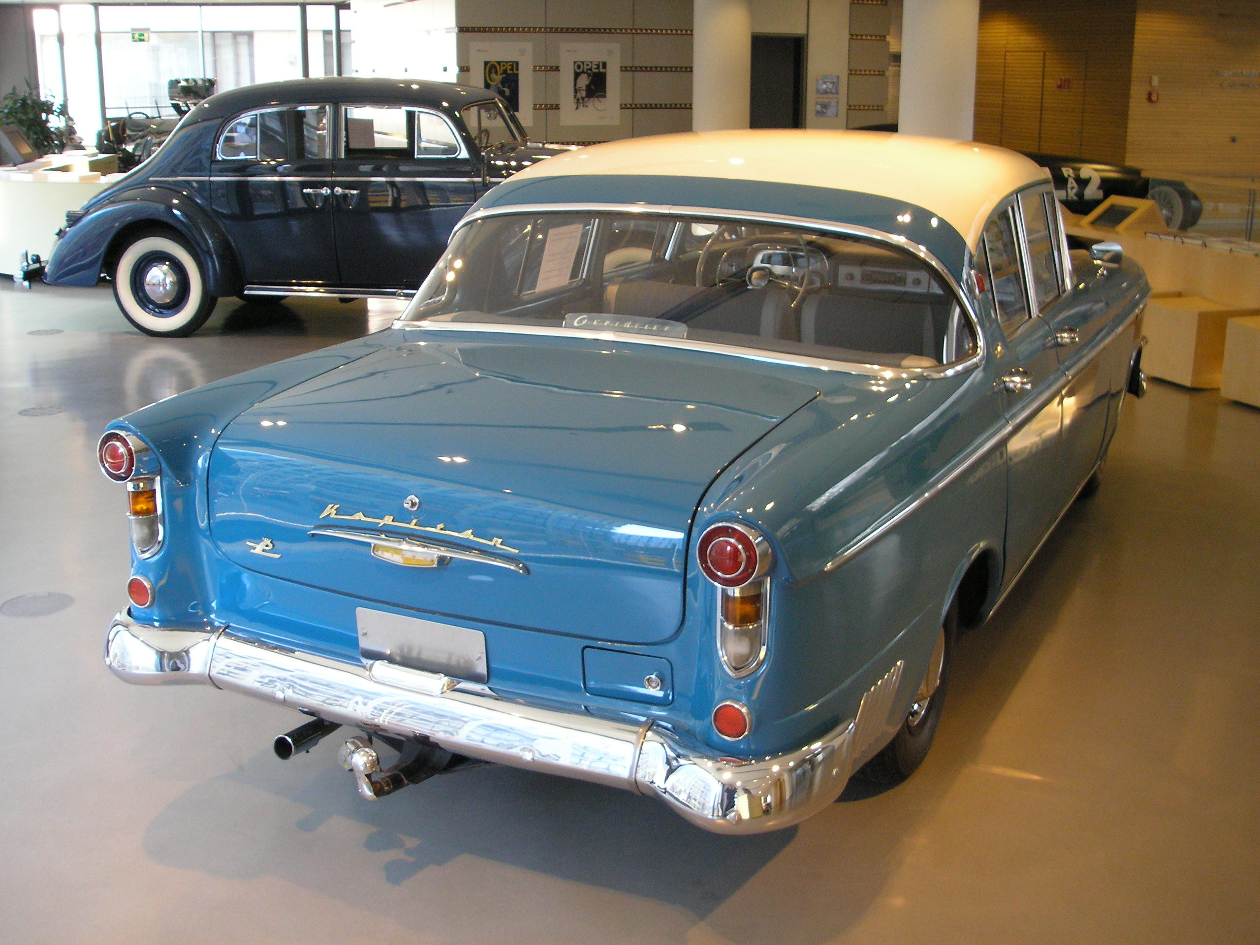 Description: Opel Kapitän P 2,5 Model, im Opel Zentrum in Berlin an der Friedrichstraße. Baujahr 1958, Vierzylinder, 2,5 Liter, 110 PS. Opel Kapitän P 2.5, image taken at the Opel Zentrum in Berlin at Friedrichstraße. Model of around 1958 or later. Source: self-made, I release it into the public domain. Gryffindor 17:22, 9 March 2006 (UTC)